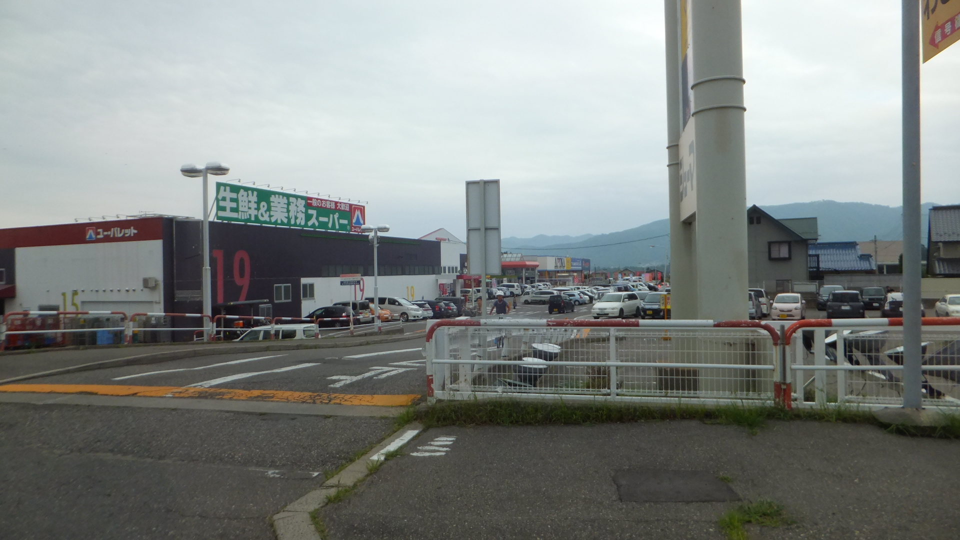 ユーパレット穂高店